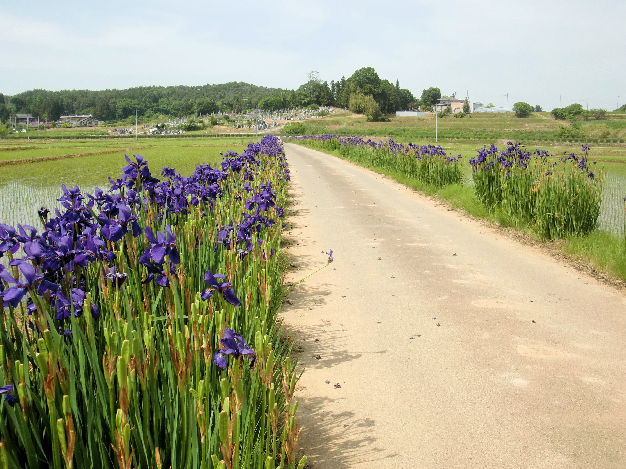 郡山市三穂田町大谷 あやめロード